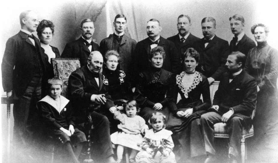 Fredrik Sundbergs (1830-1913) familj. Stående: John Hallberg, Ida Hallberg (f. Sundberg), Gustaf Sundberg, Lennart Larsson, Richard Sundberg, Embleton Sundberg, Emil Sundberg, Yngve Larsson, Ingrid Larsson. Sittande: Halvar Sundberg, Fredrik Sundberg, Agda Sundberg (född Berggren), Karin Sundberg (f. Mellgren), Ellen Sundberg (f. Knaust), Arvid Sundberg. På golvet: Stig Sundberg, Gunhild Sundberg.